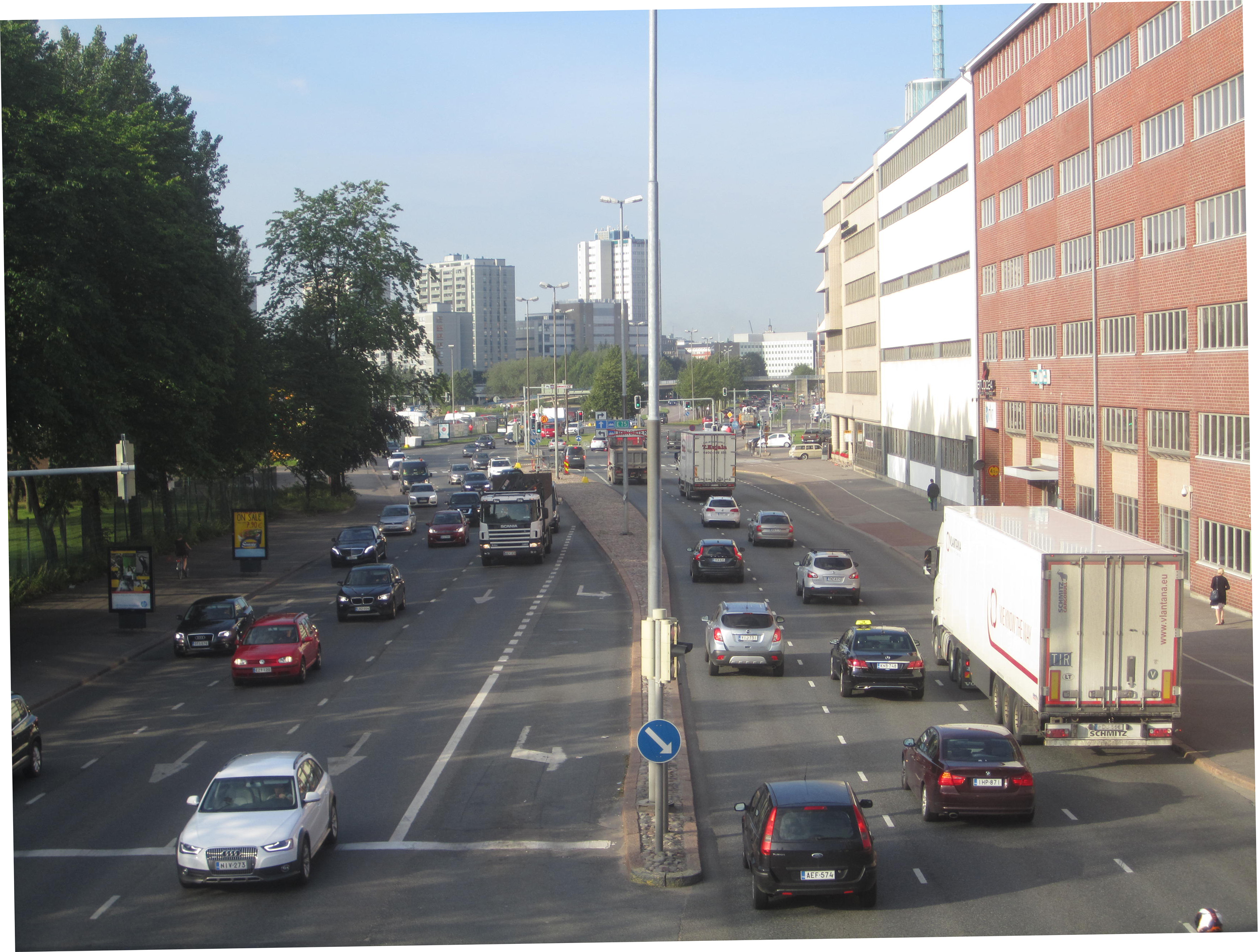 Sörnäisten rantatie Helsingissä.